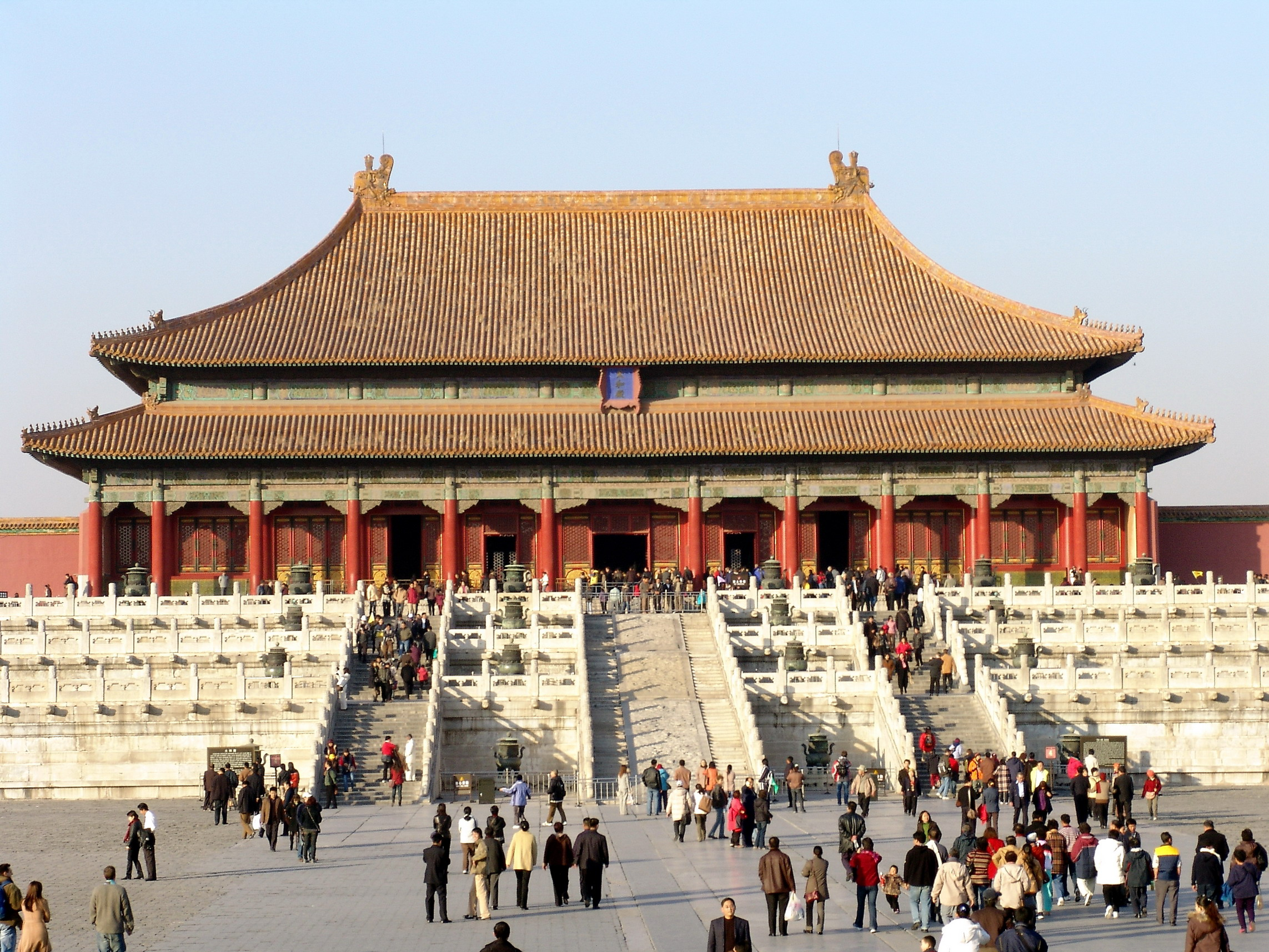 Forbidden City